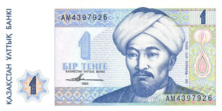 1 тенге 1993 года